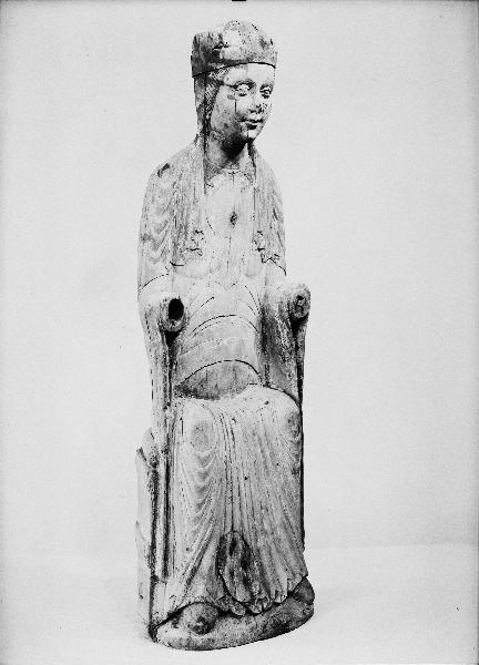 Träskulptur, medeltida. Kategori: (05) SkulpturerTräskulptur, medeltida.